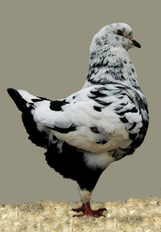 King (Black Tigered)